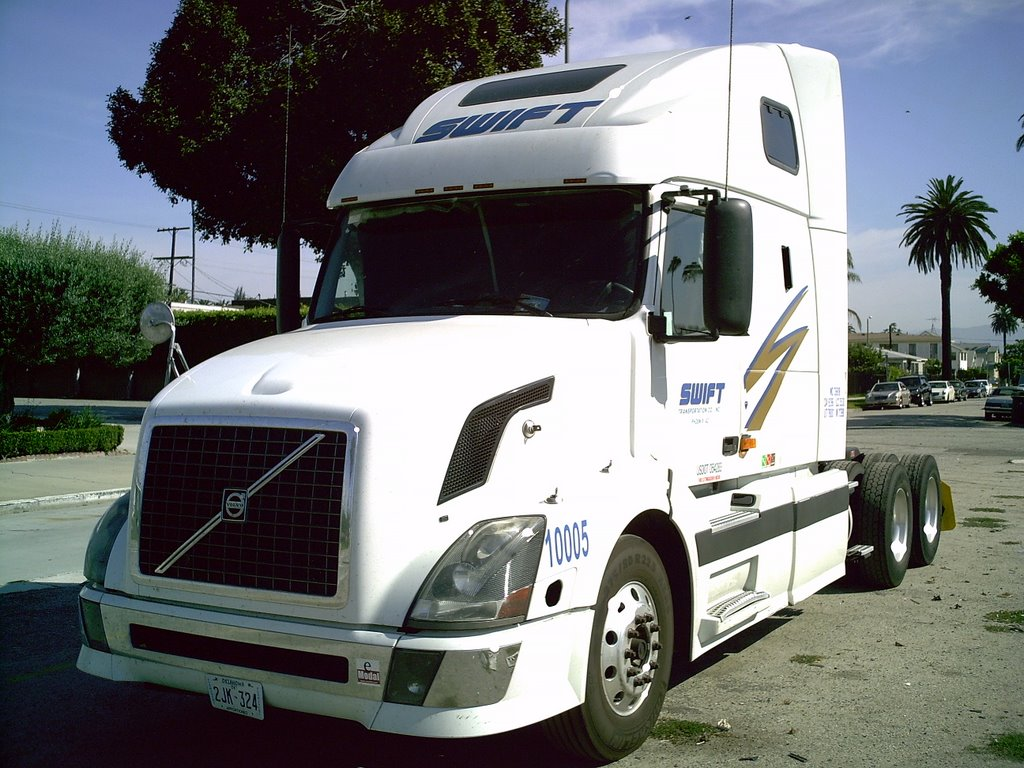 Tracteur Volvo USA Los Angeles